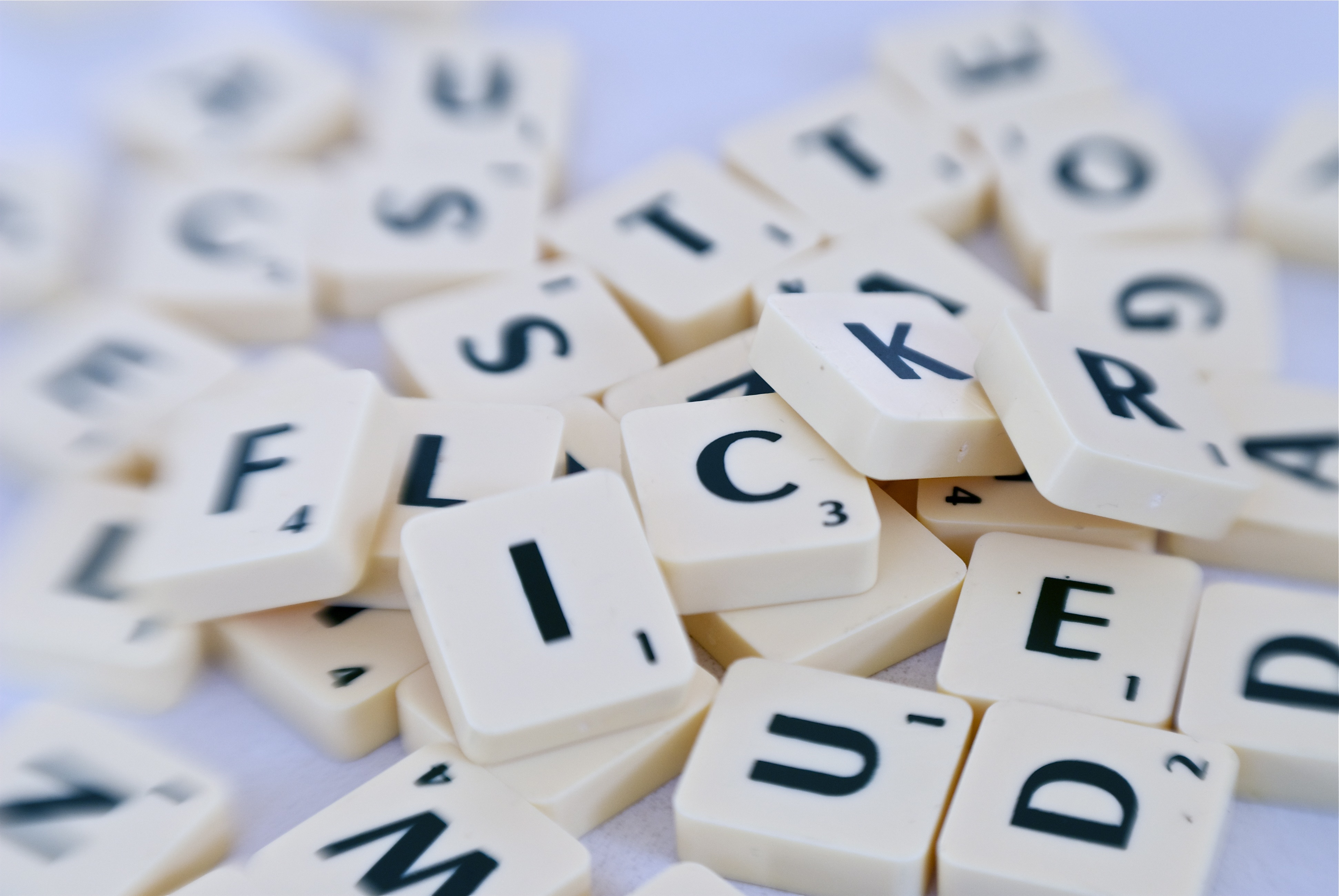 Flickr